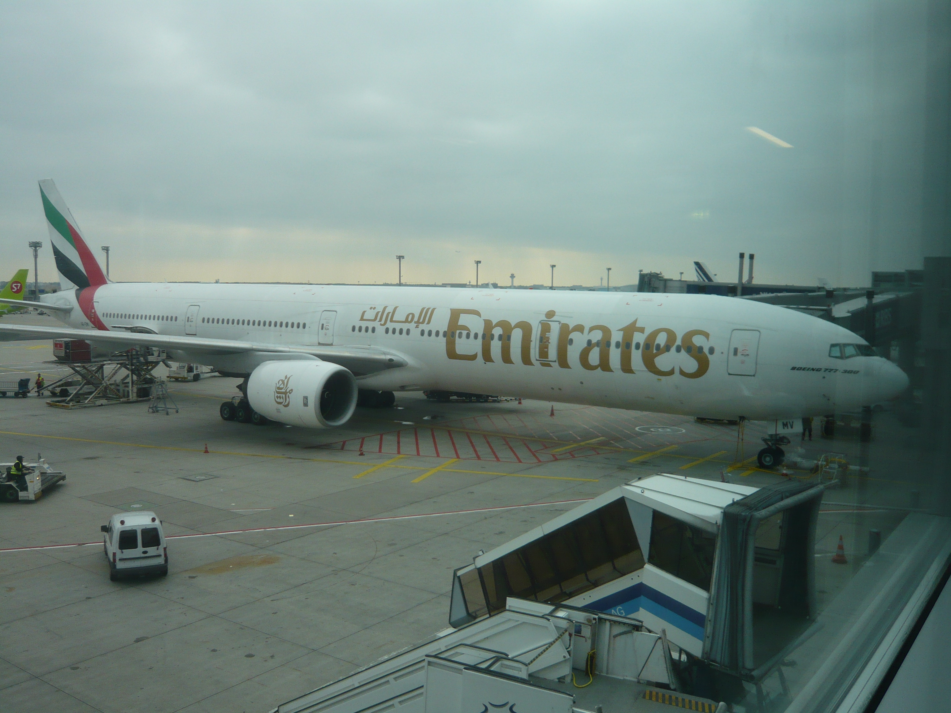 Eine B777-300 ER der Emirates